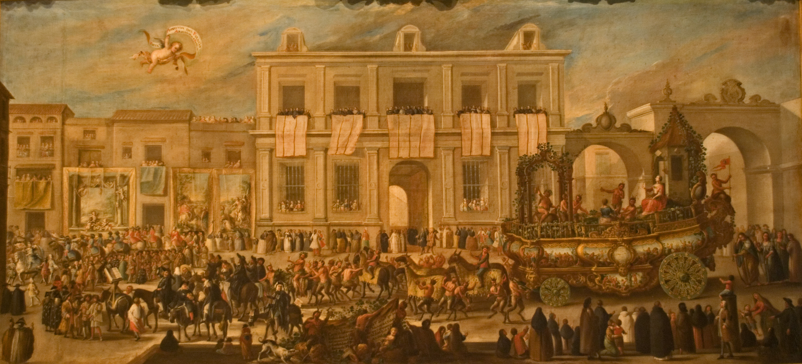 Esta obra, llamada 'Carro de la Común Alegría', forma parte de un grupo de ocho grandes lienzos de igual tamaño que representan los carros triunfales que desfilaron por la ciudad de Sevilla en 1747 durante la Máscara que los obreros de la Real Fábrica de Tabacos de Sevilla celebraron con motivo de la subida al trono español de Fernando VI y de su esposa, la reina Bárbara de Braganza.